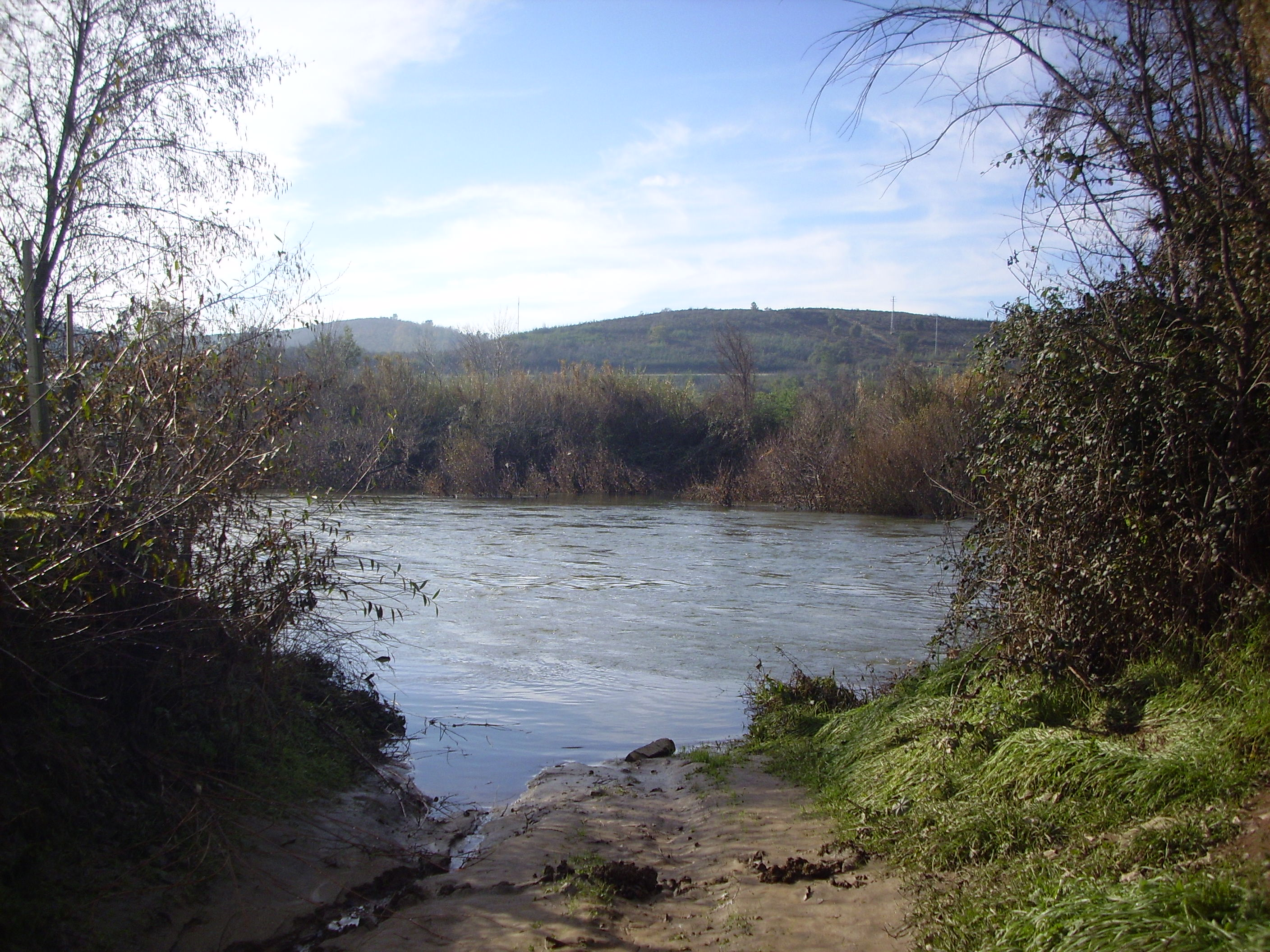 Mirandela